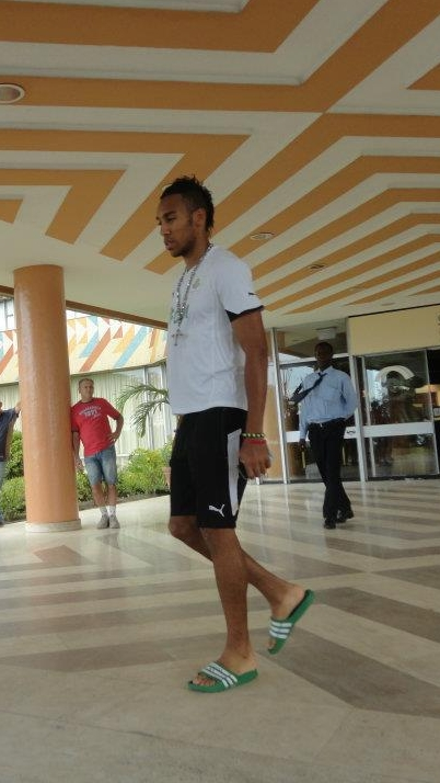 Novembre 2011, préparation pour le match Gabon-Brésil